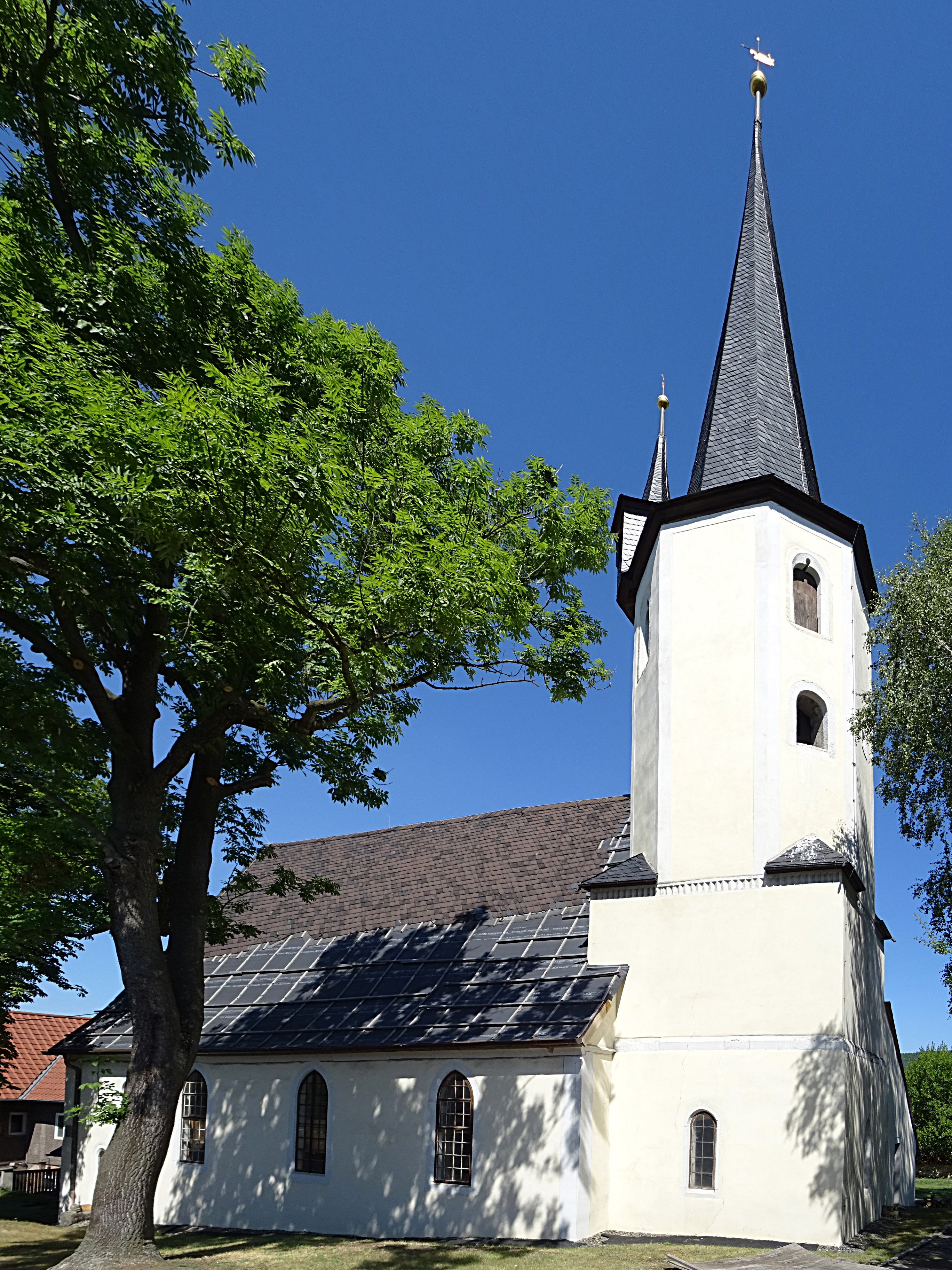 Kirche St. Nikolai Oberwellenborn von Süden